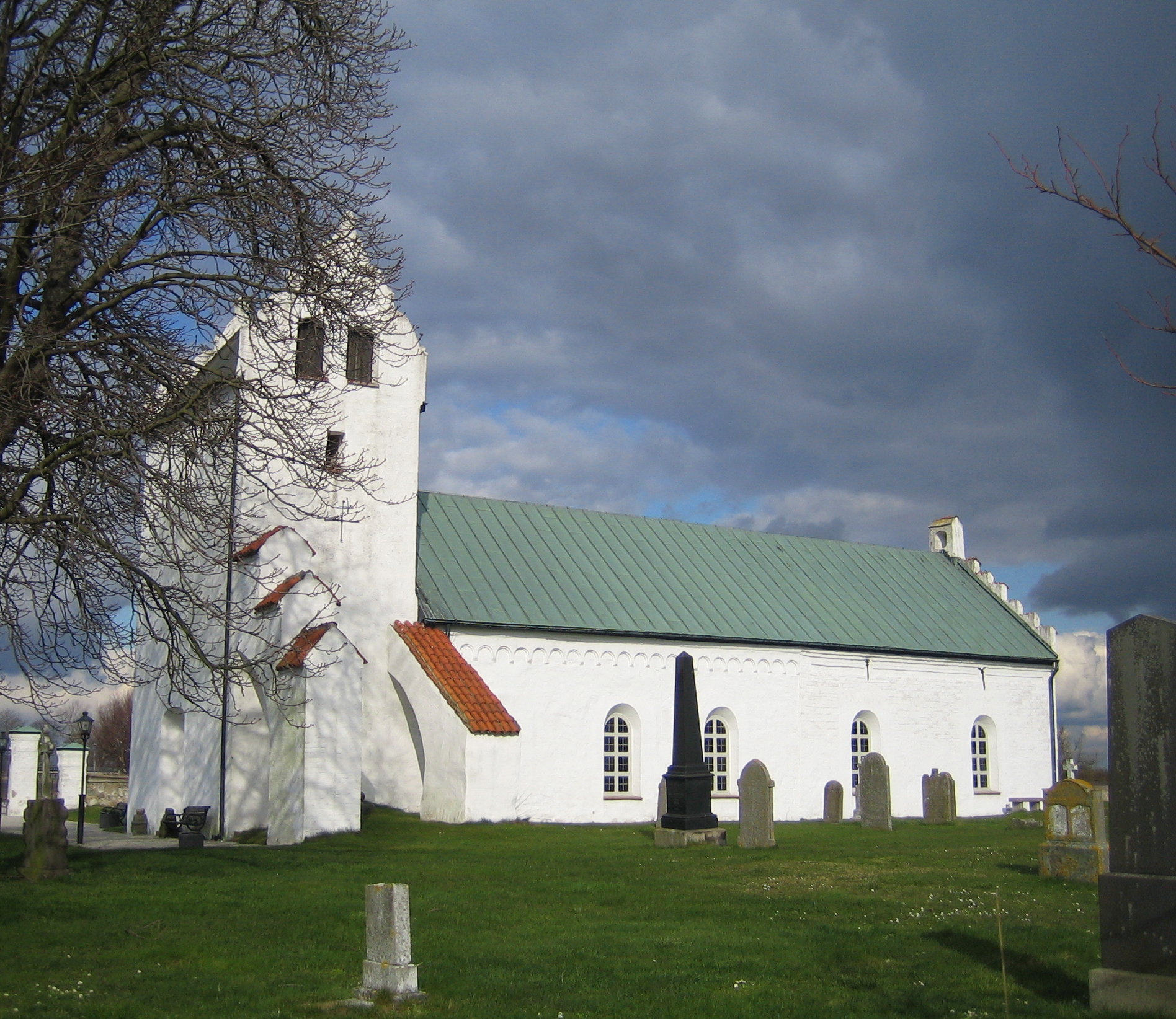 Stora Hammars kyrka, Skåne, Sweden